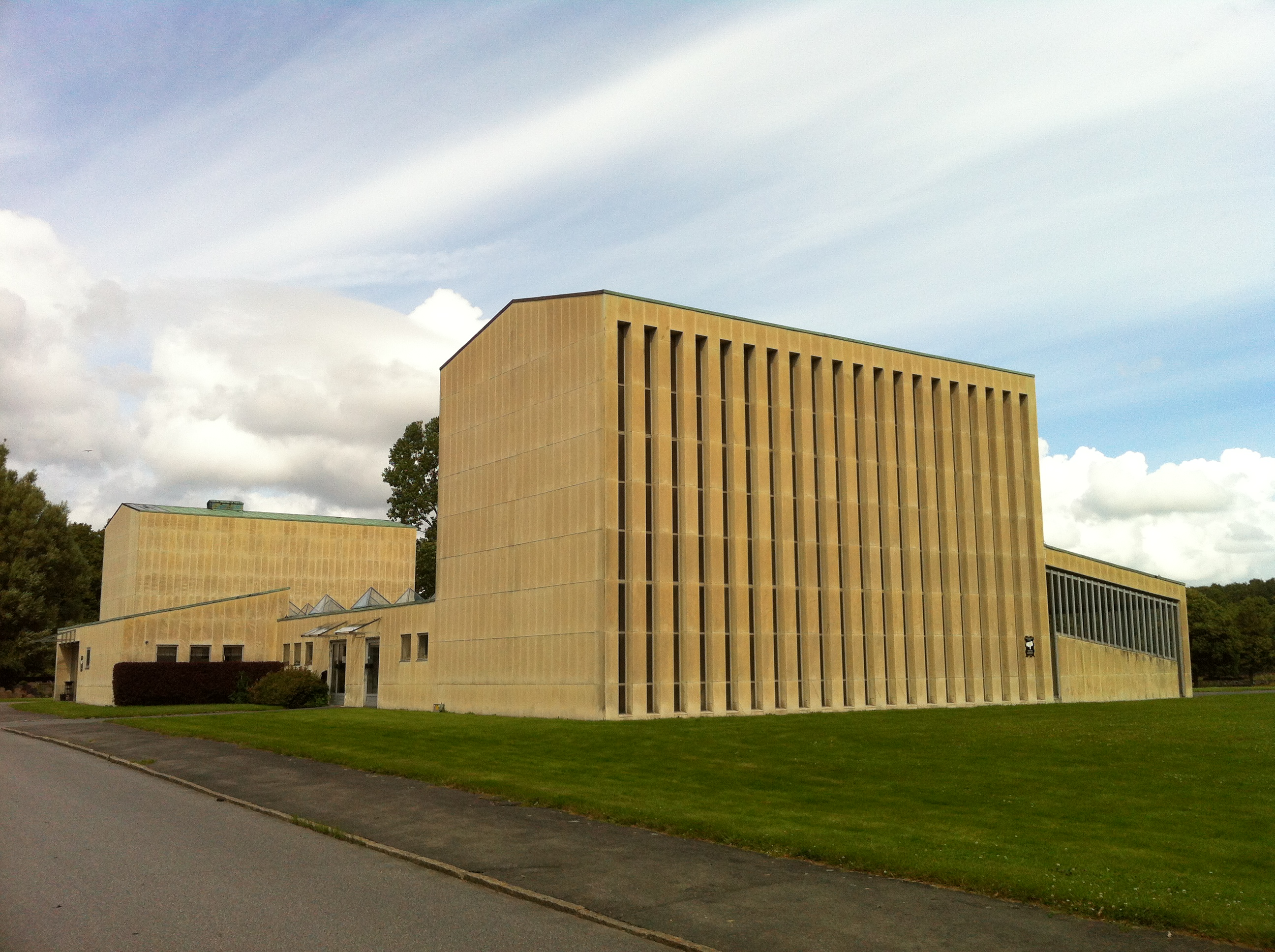 Baksidan av Sankt Lukas och Sankt Markus kapell på Västra kyrkogården i Göteborg. Ritade av Sven Brolid.